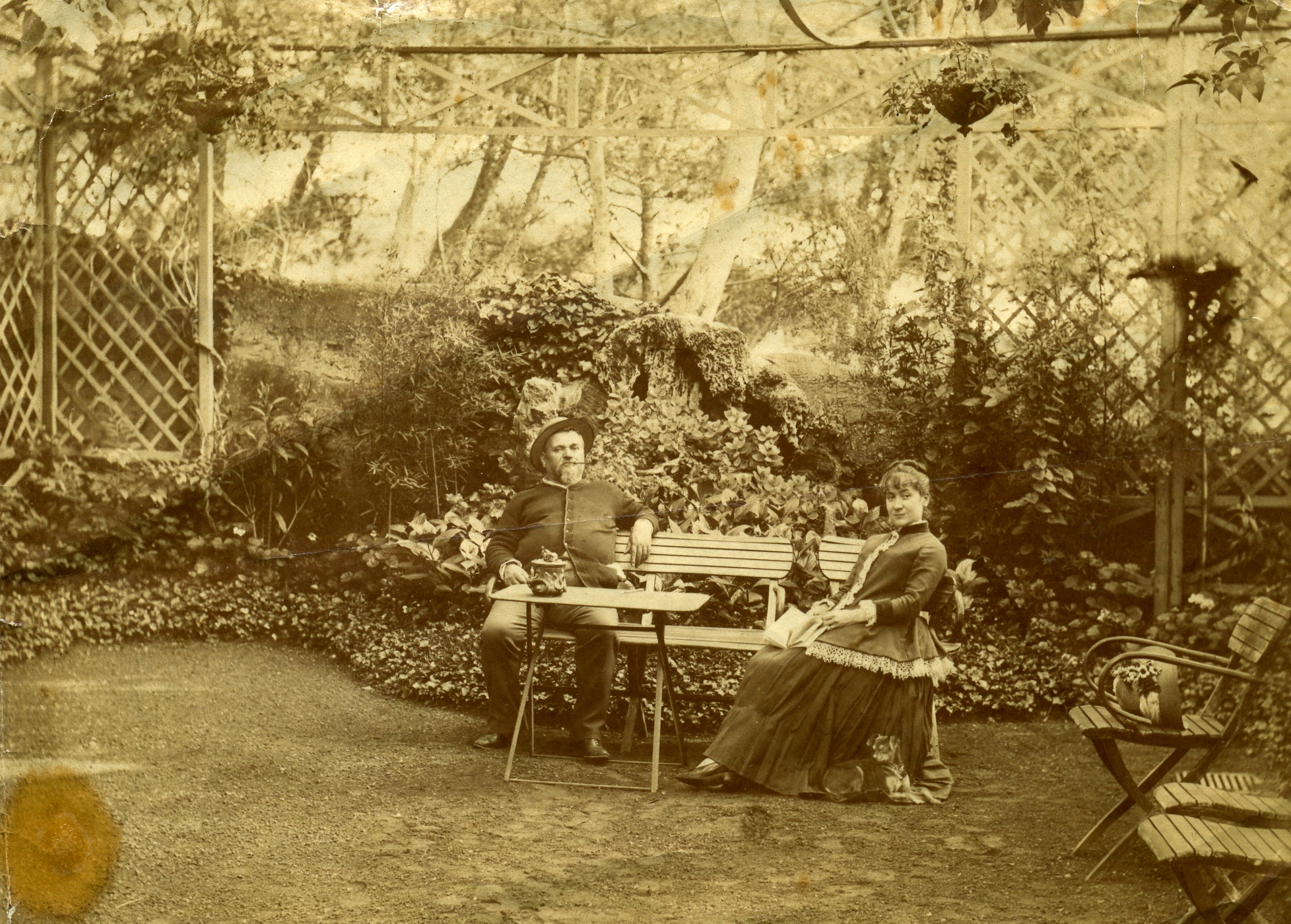 Ismaël et Marie Garcin chez eux à Marseille, vers 1890